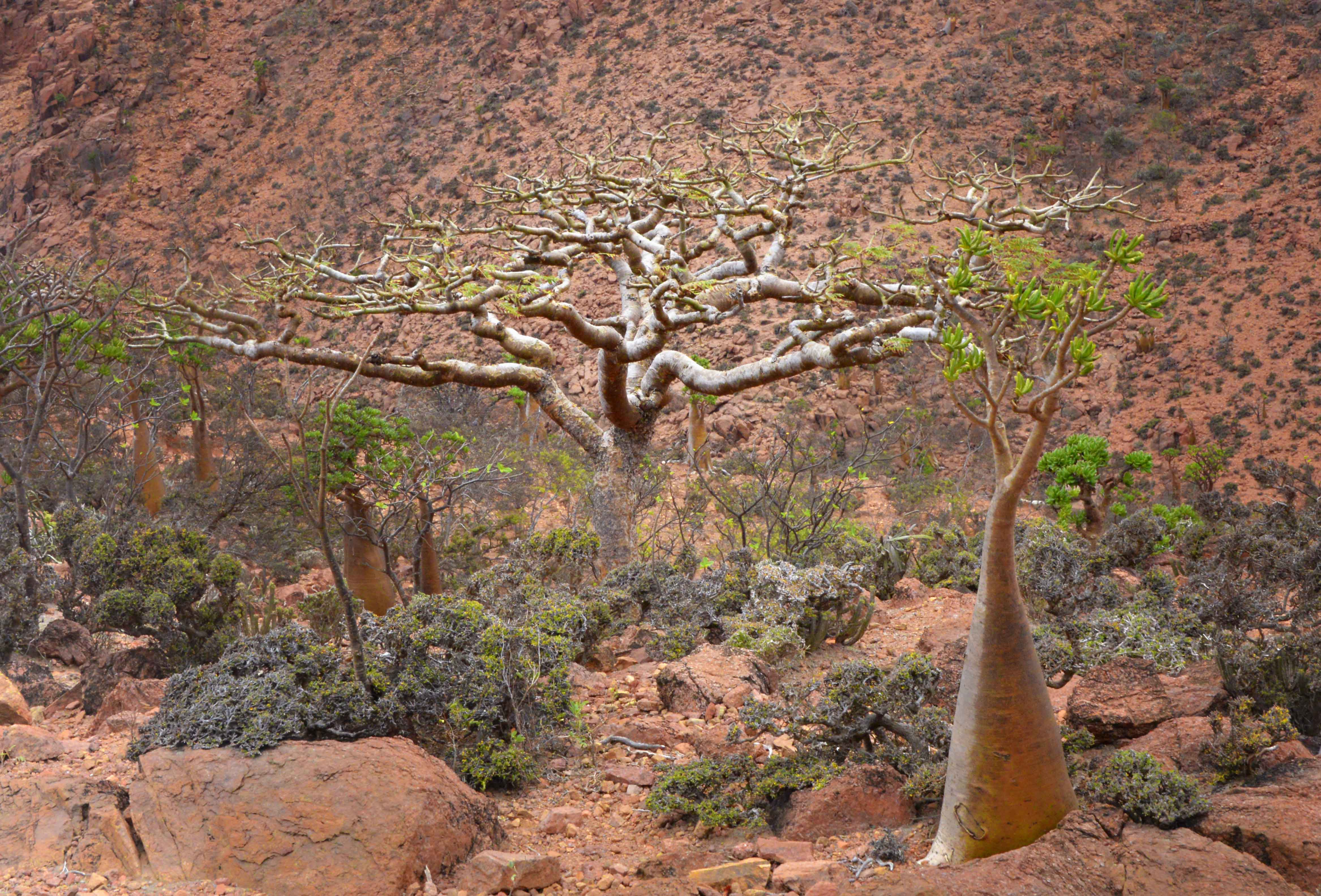 Yemen